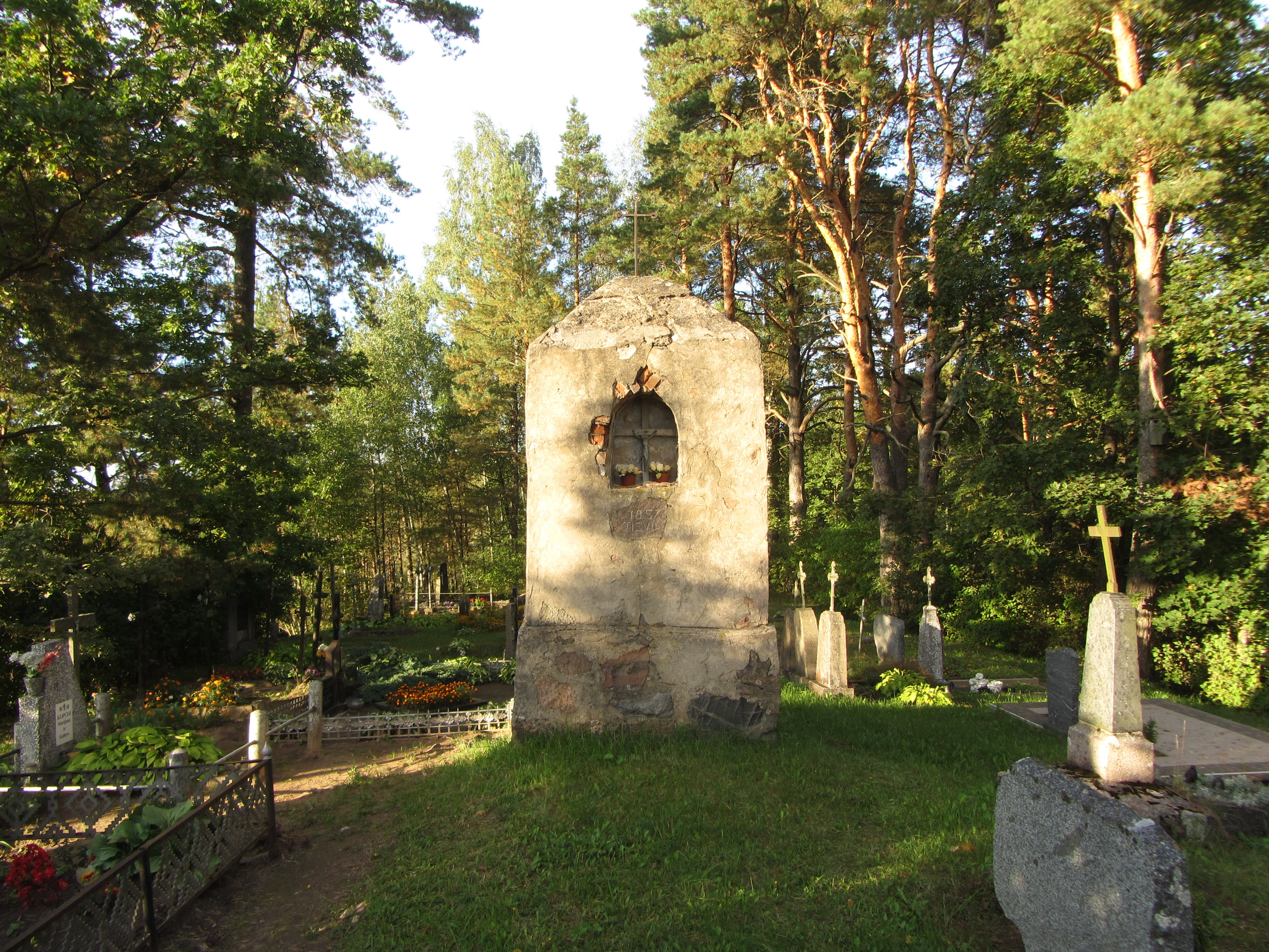 Aučynos 18101, Lithuania